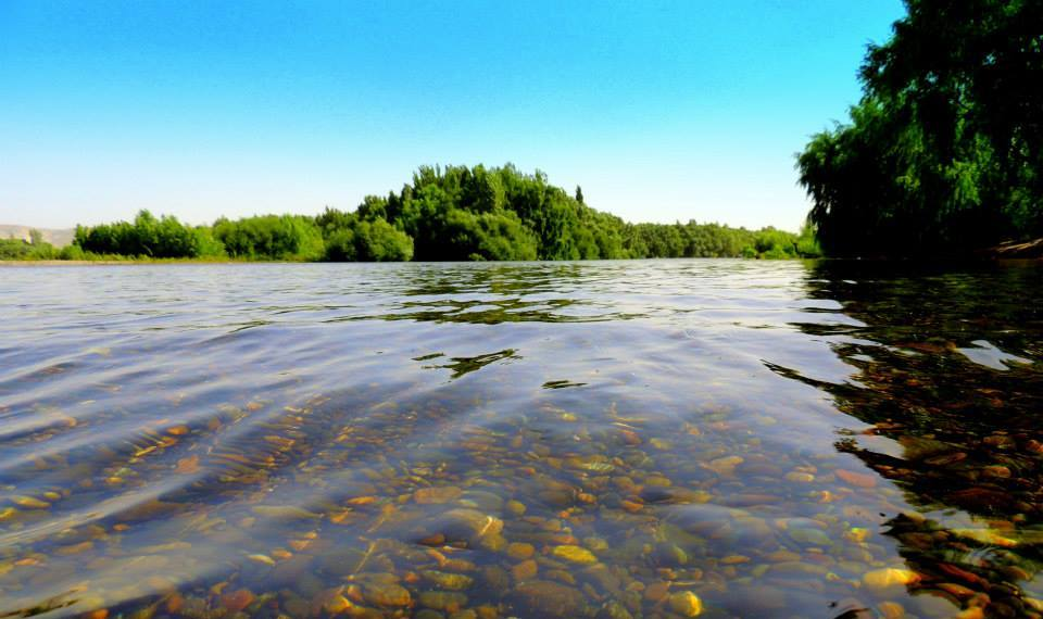 Las Aguas más Transparentes están en La Ribera, Gral Roca. Foto de Javier Larrea Fotografía